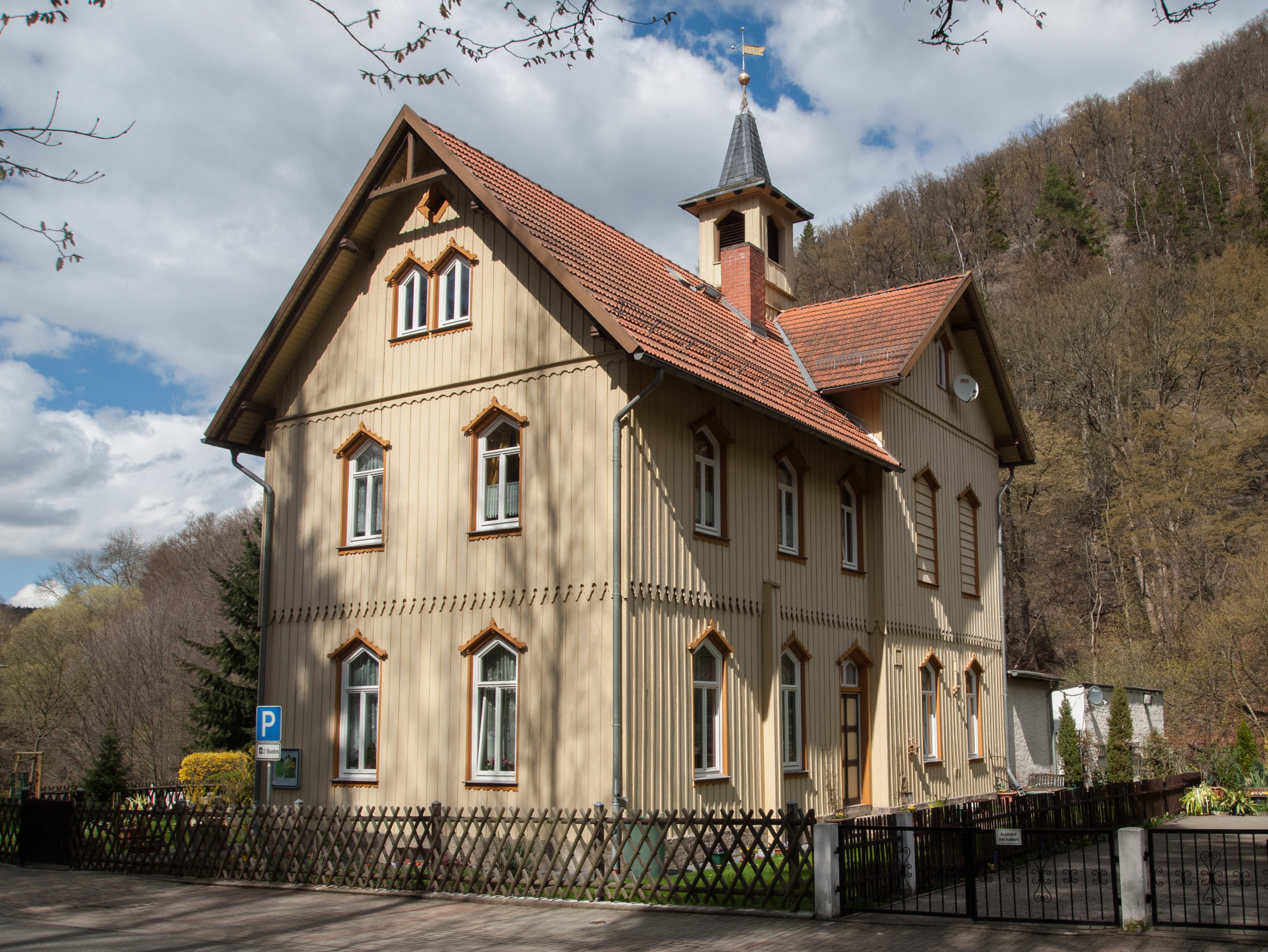 Treseburg (Stadt Thale, Landkreis Harz; Sachsen-Anhalt) Kirche und ehemalige Schule des Dorfes